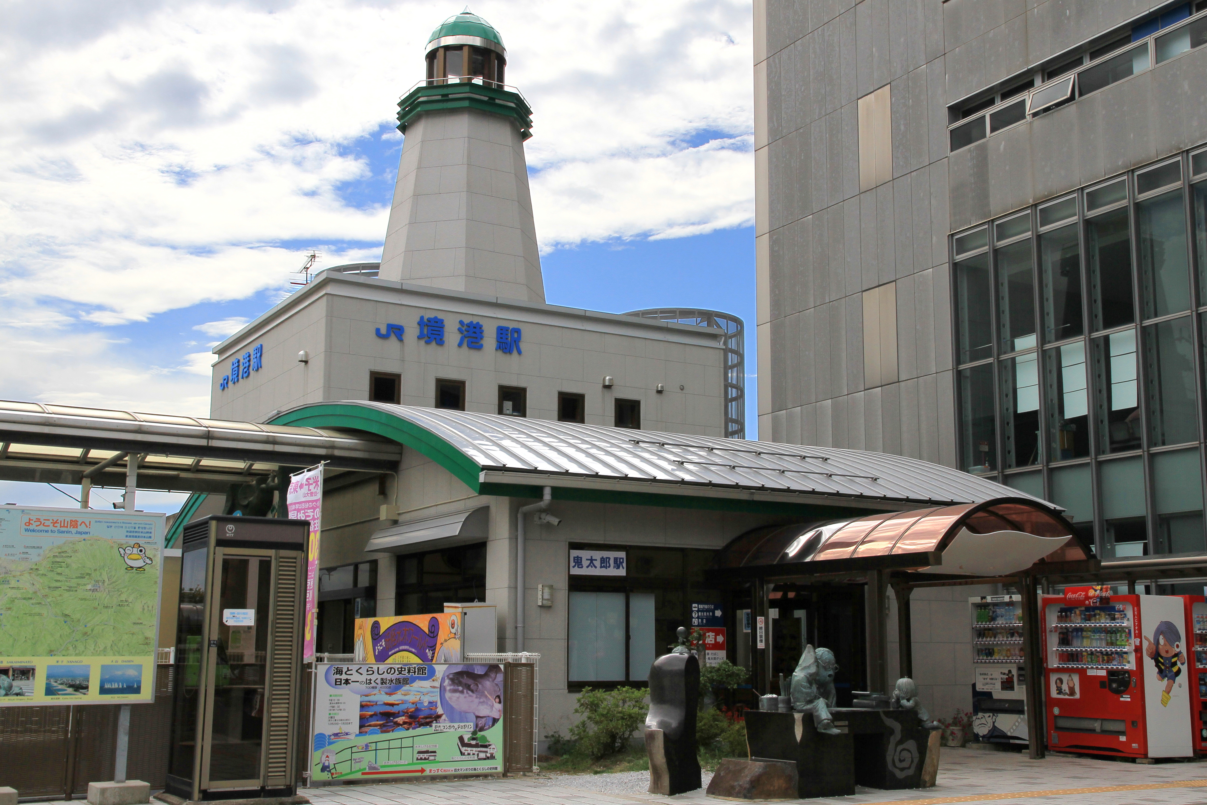 境港駅駅舎